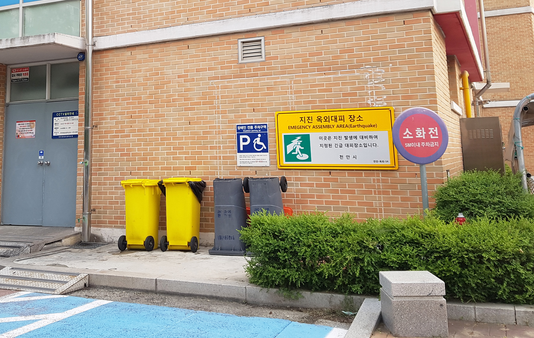 천안 쌍정초등학교